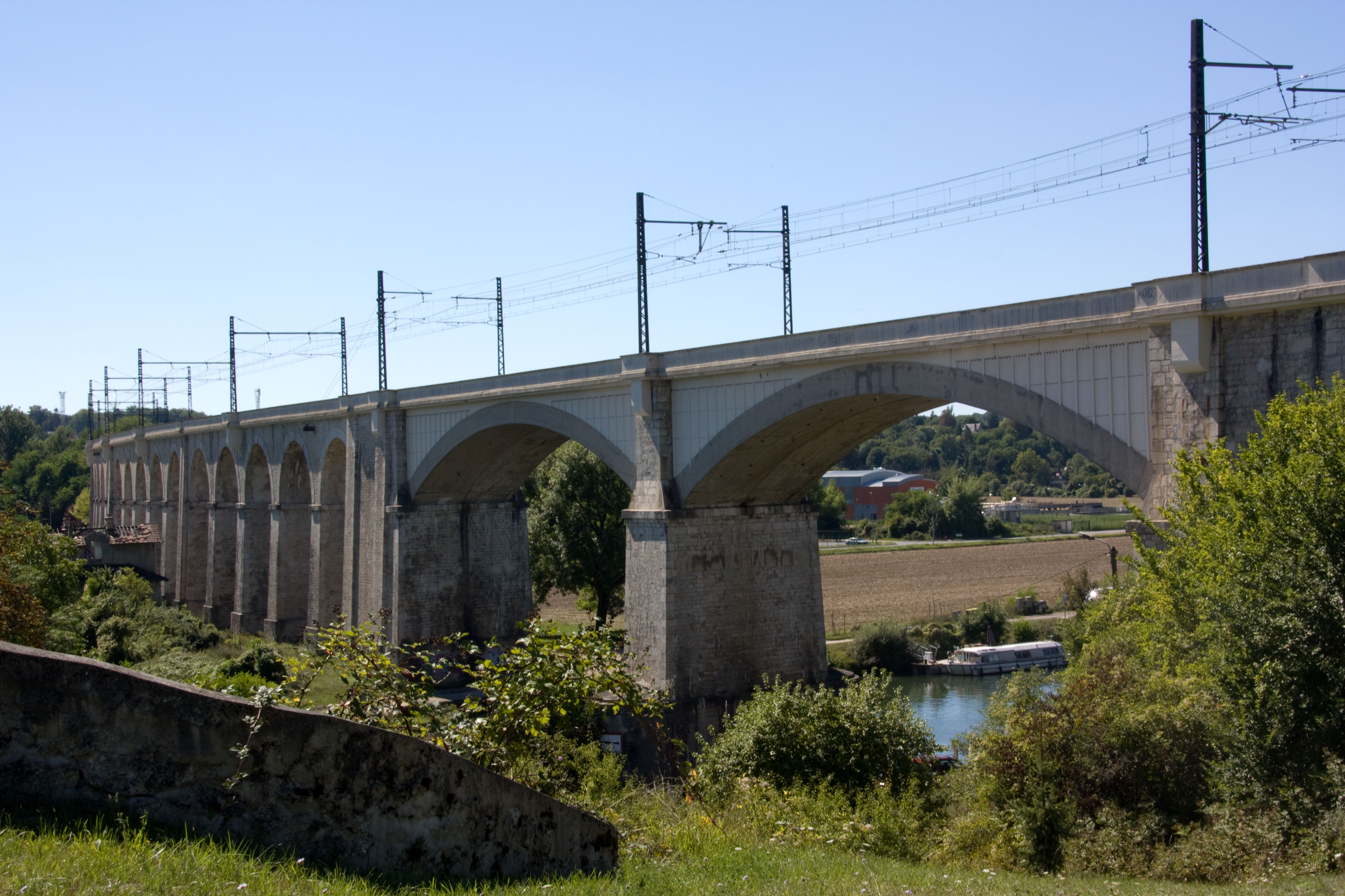 Viaduc de Moret-sur-Loing, ligne classique Paris - Marseille, Seine-et-Marne, France